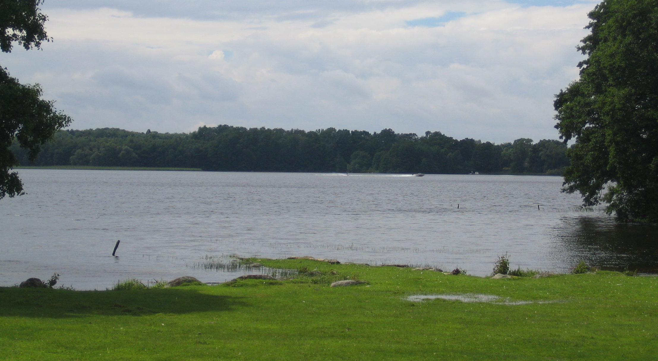 Ivösjön, largest lake of Skåne in Sweden